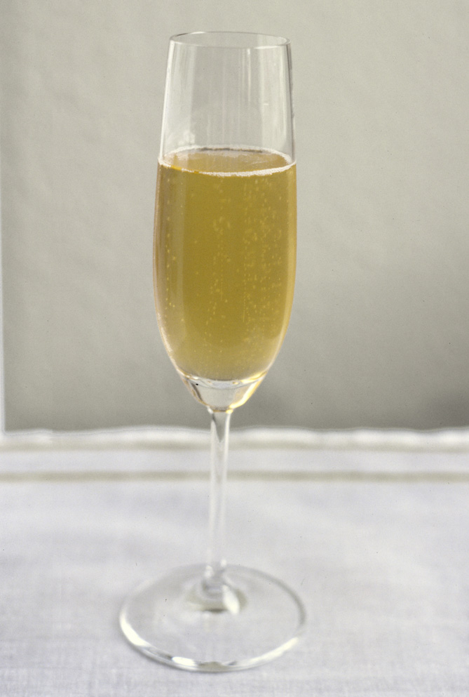 Verre de champagne / Glass of champagne / Glas Champagner